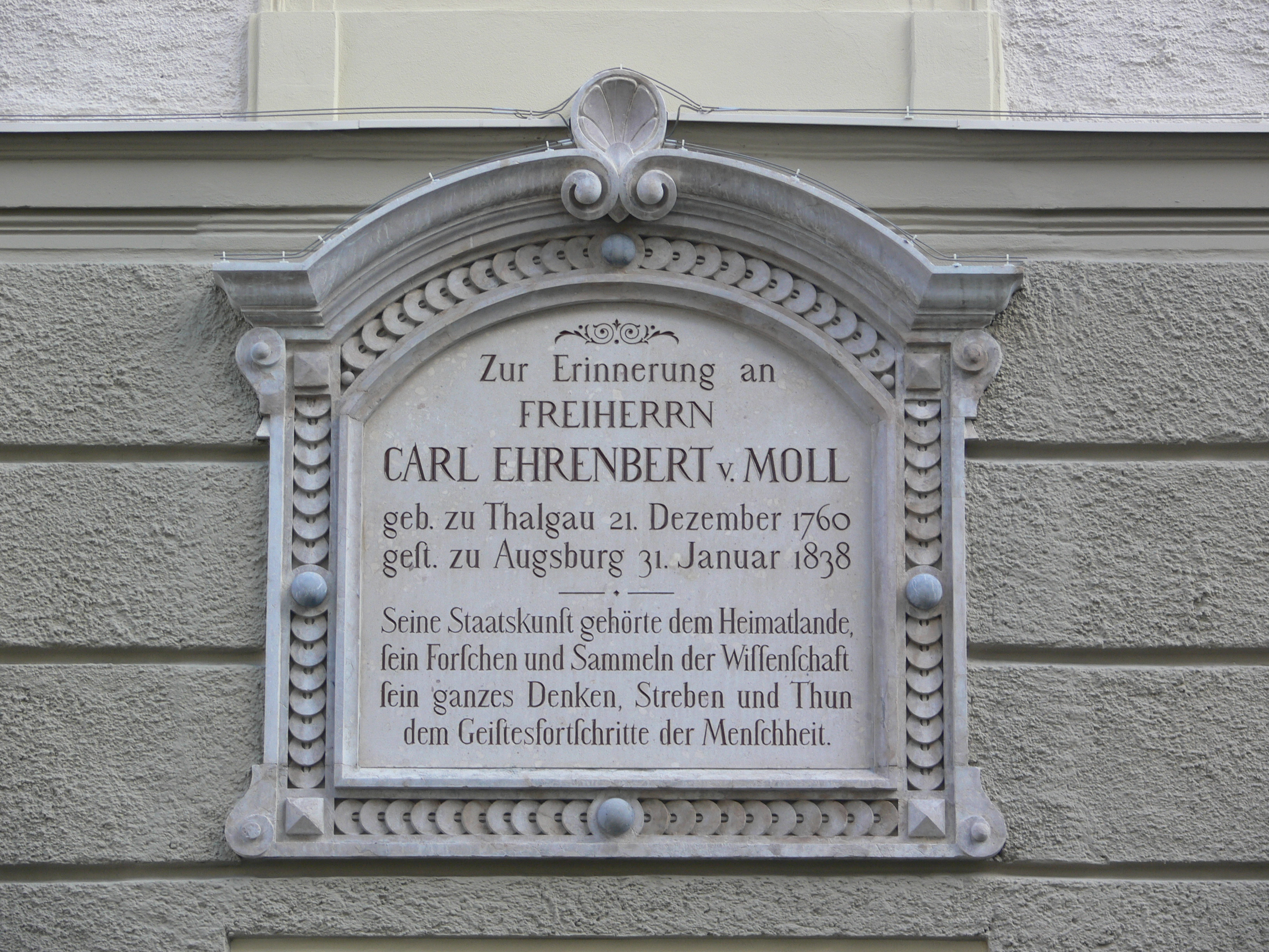 Alte Universität, Universitätsplatz, Tafel für Carl Ehrenbert von Moll